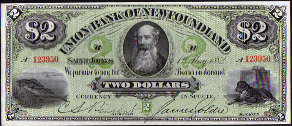 Newfoundland 2 dollar bill